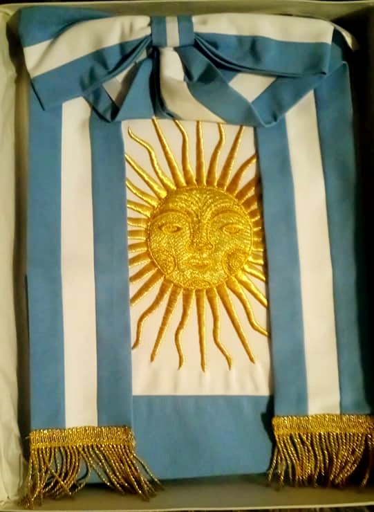 Foto de la Bandera de Ceremonias de la Asociación Belgraniana de CABA en el momento de ser recibida por el Ing. Alejandro Rossi Belgrano de manos de la vexilóloga Beatríz Rincón en el acto realizado en el Club del Progreso el 1 de junio de 2019